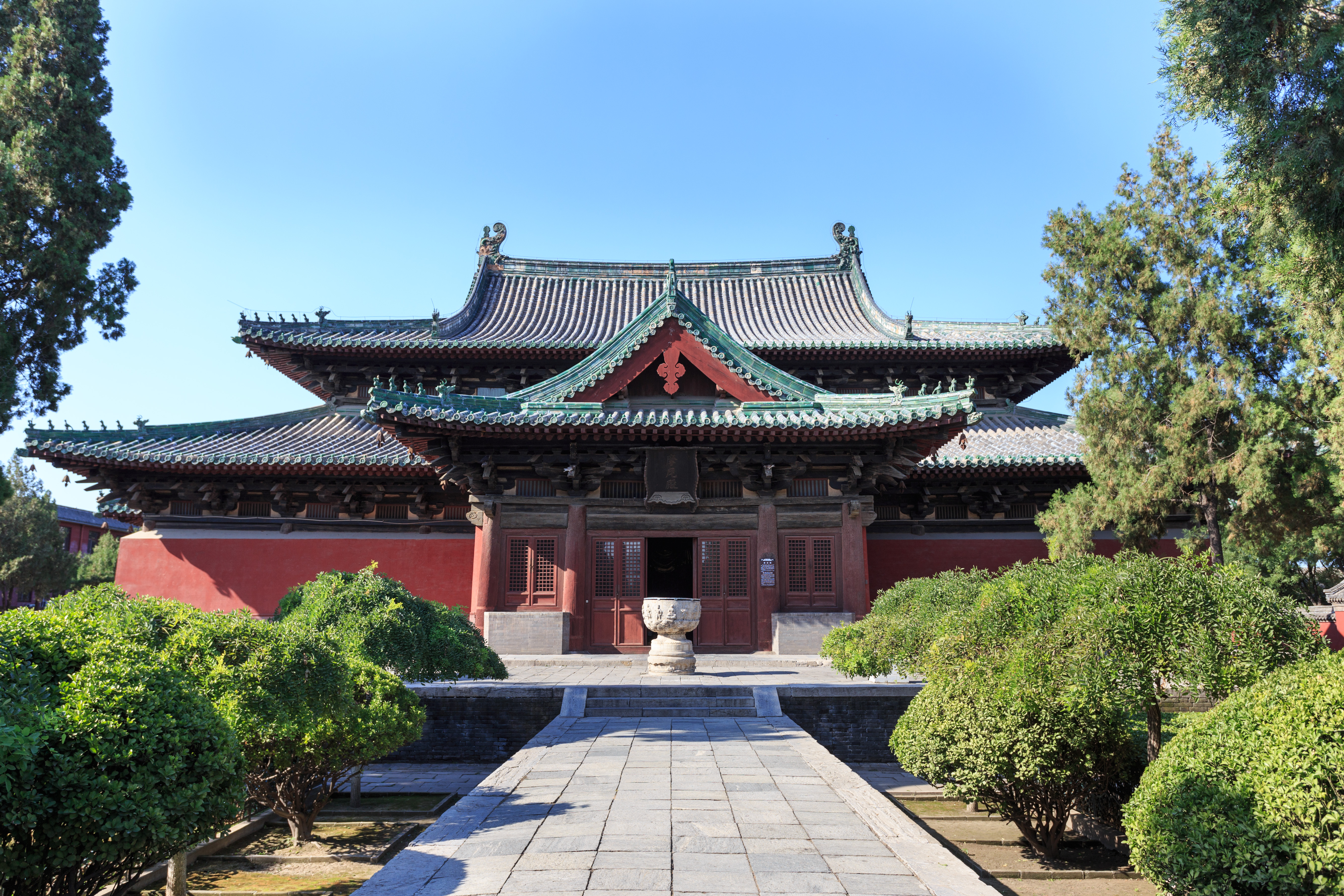 正定隆兴寺 摩尼殿